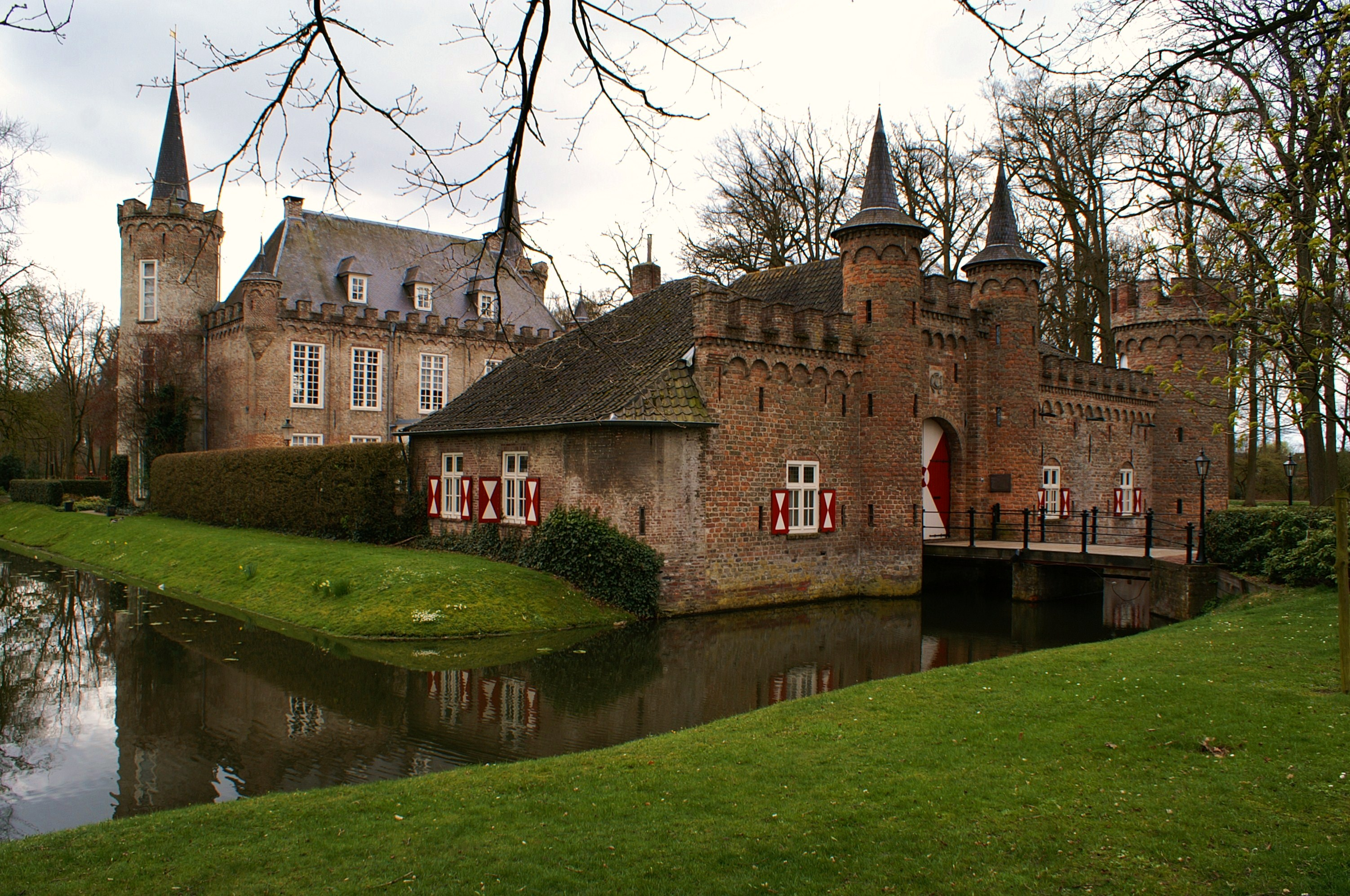 Kasteel Henkenshage te Sint-Oedenrode.